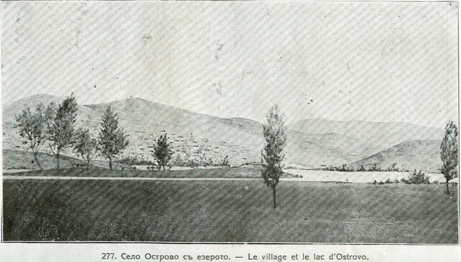 Острово в началото на 20 век.